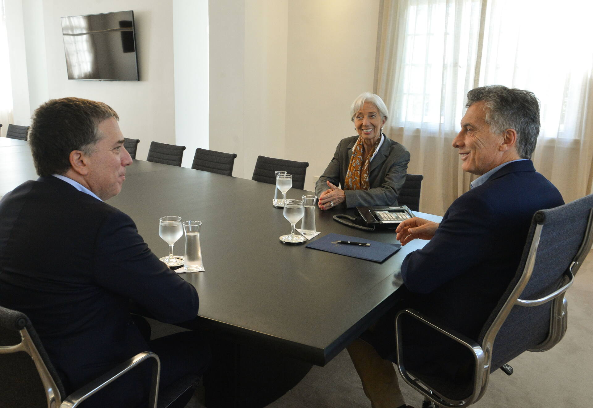 El presidente Mauricio Macri recibió en la residencia de Olivos a la directora del Fondo Monetario Internacional, Christine Lagarde. También participó de la audiencia el ministro de Hacienda, Nicolás Dujovne.